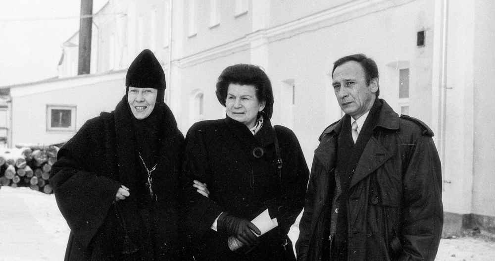 Лётчик-космонавт генерал-майор профессор Валентина Владимировна Терешкова посетила Никольский монастырь в городе Переславле в ходе своей благотворительной поездки по Ярославской области. Слева направо: игумения Евстолия (Ольга Сергеевна Афонина, настоятельница Никольского женского монастыря), Валентина Владимировна Терешкова (руководитель Российского центра международного научного и культурного сотрудничества), Евгений Алексеевич Мельник (мэр города Переславля-Залесского).